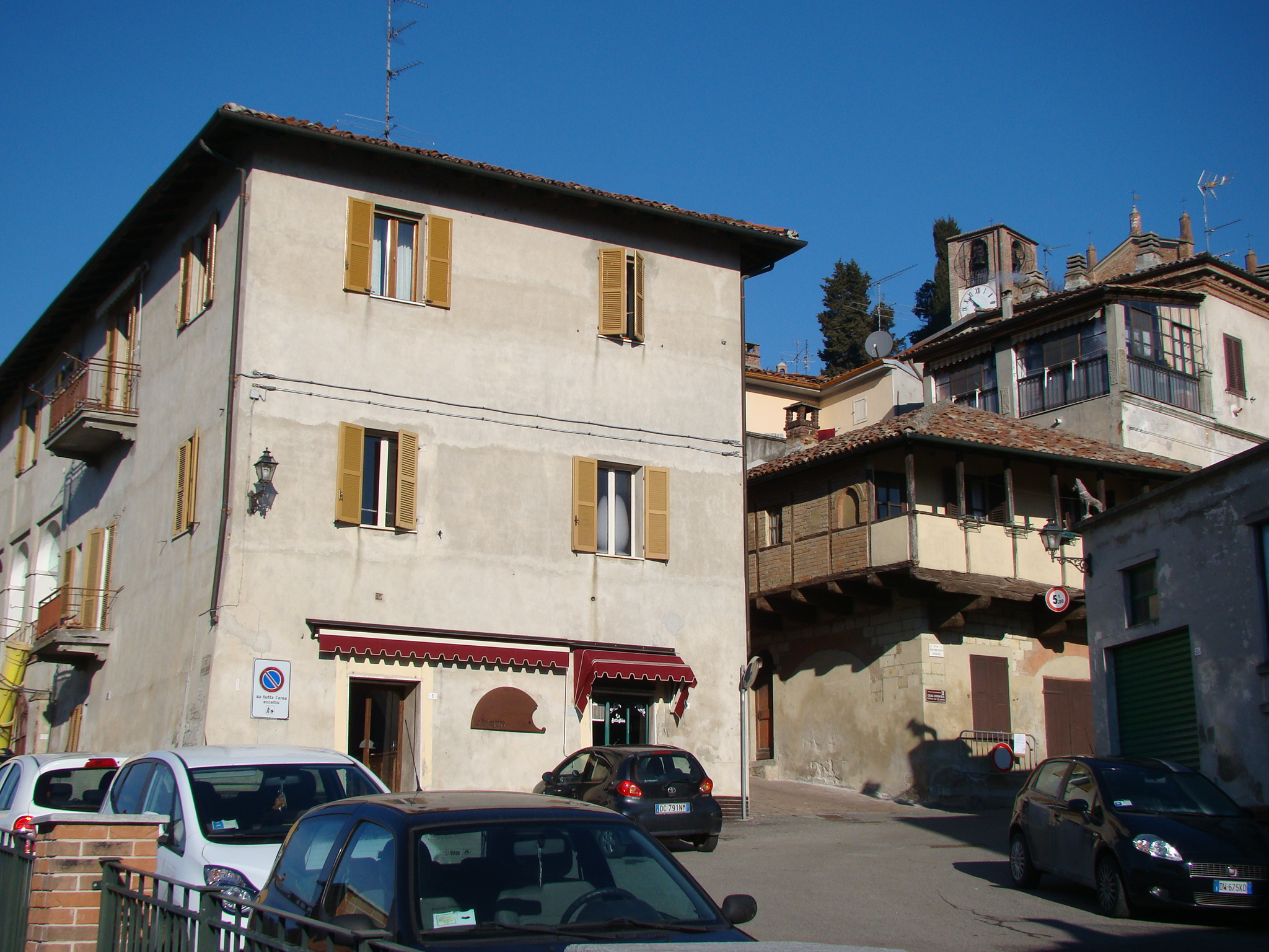 Piazza S. Giovanni Battista